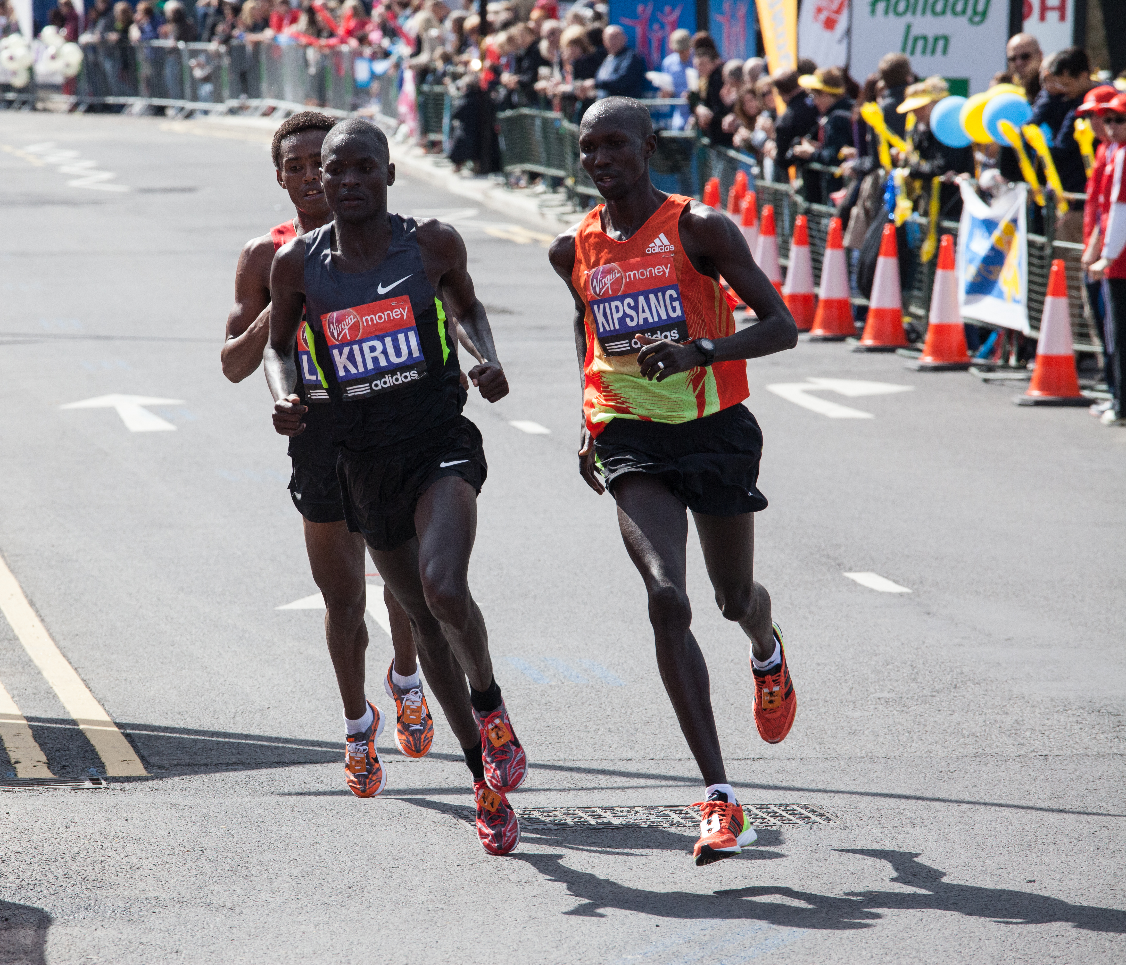 Abel Kirui, Wilson Kipsang during 2012 London Marathon